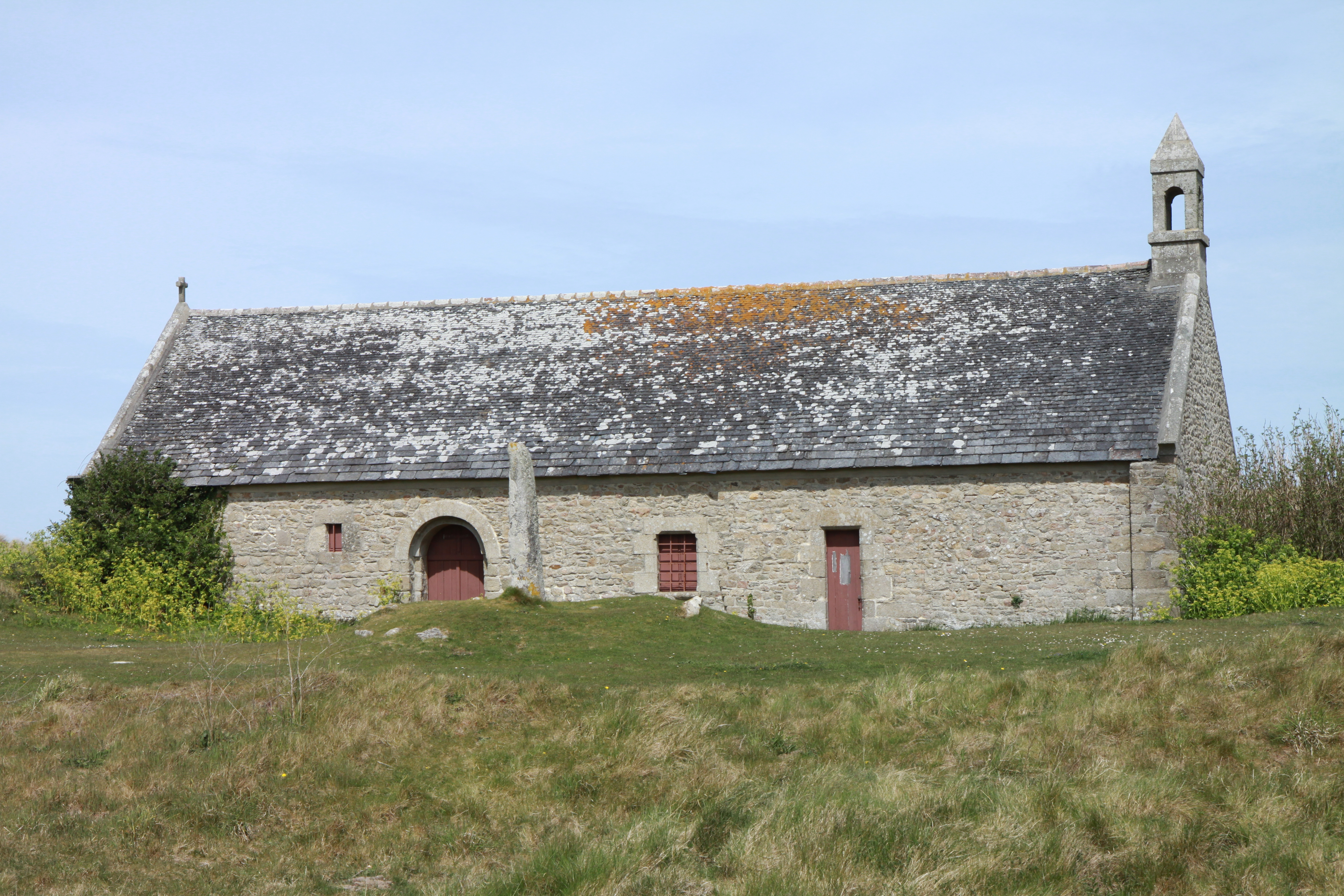 La chapelle Saint-Guvroc dans les dunes de Keremma dans le nord Finistère.